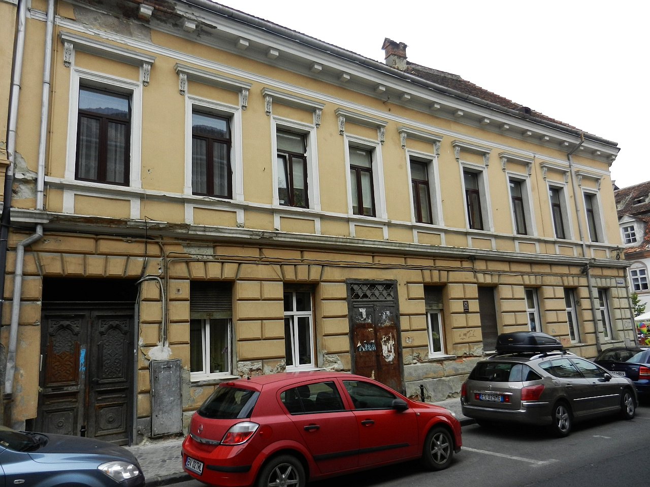 Casă monument istoric